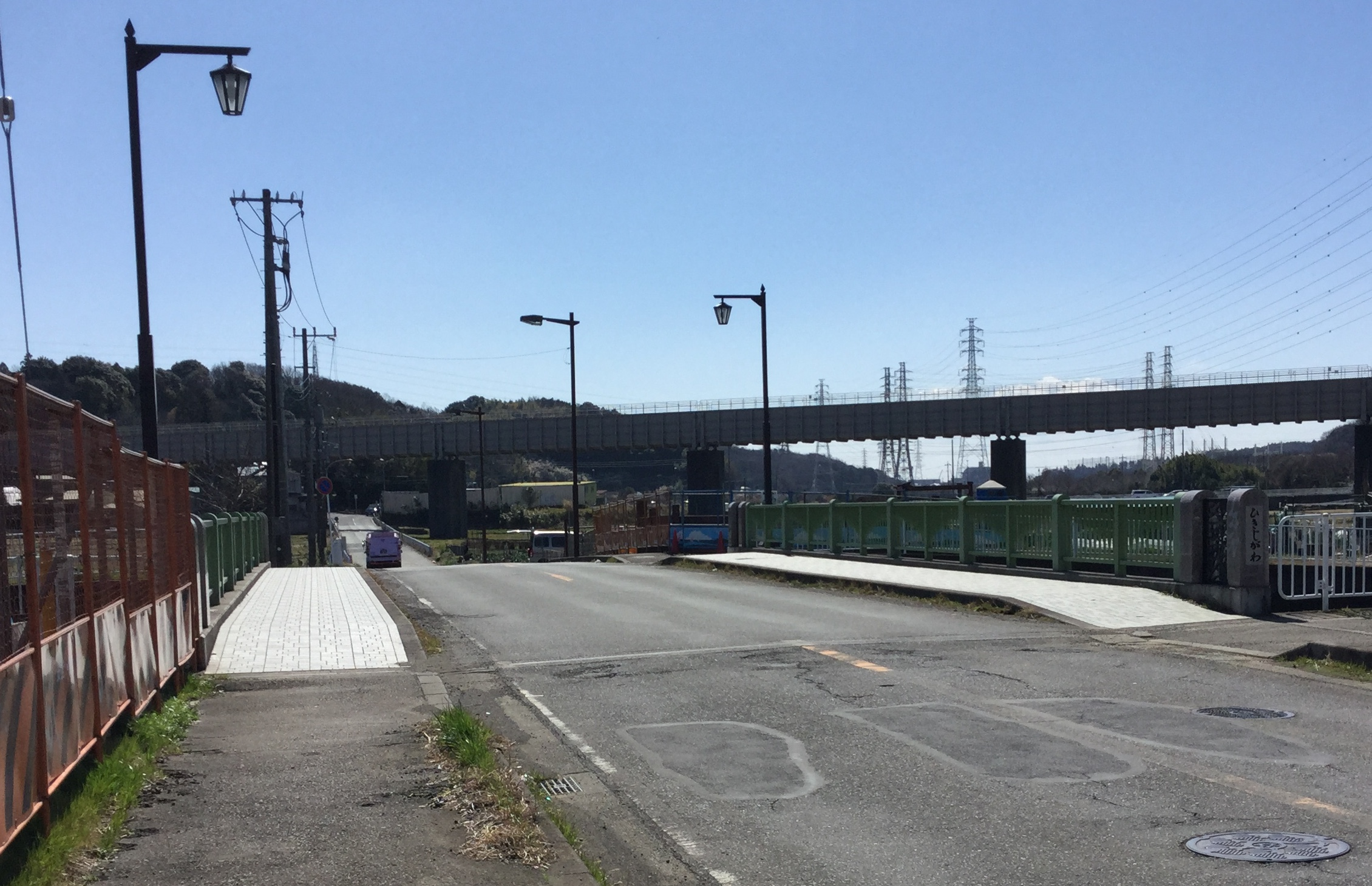 引地川にかかる石川橋 （神奈川県藤沢市石川）